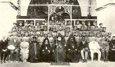 תזמורת ארבעים הילדים בשנת 1924